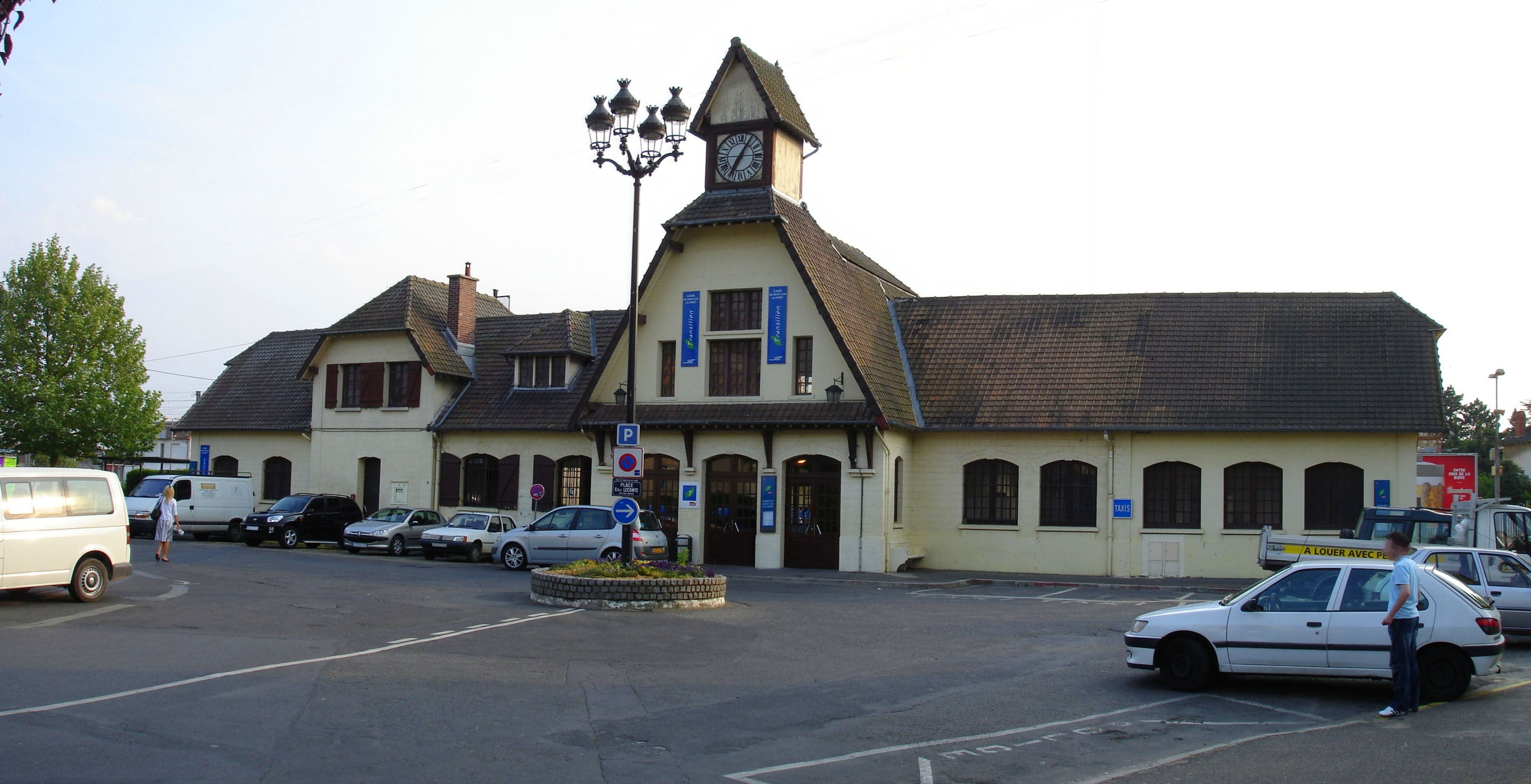 Gare de Saint-Leu-la-Forêt (Val-d'Oise) par Gustave Umbdenstock, France